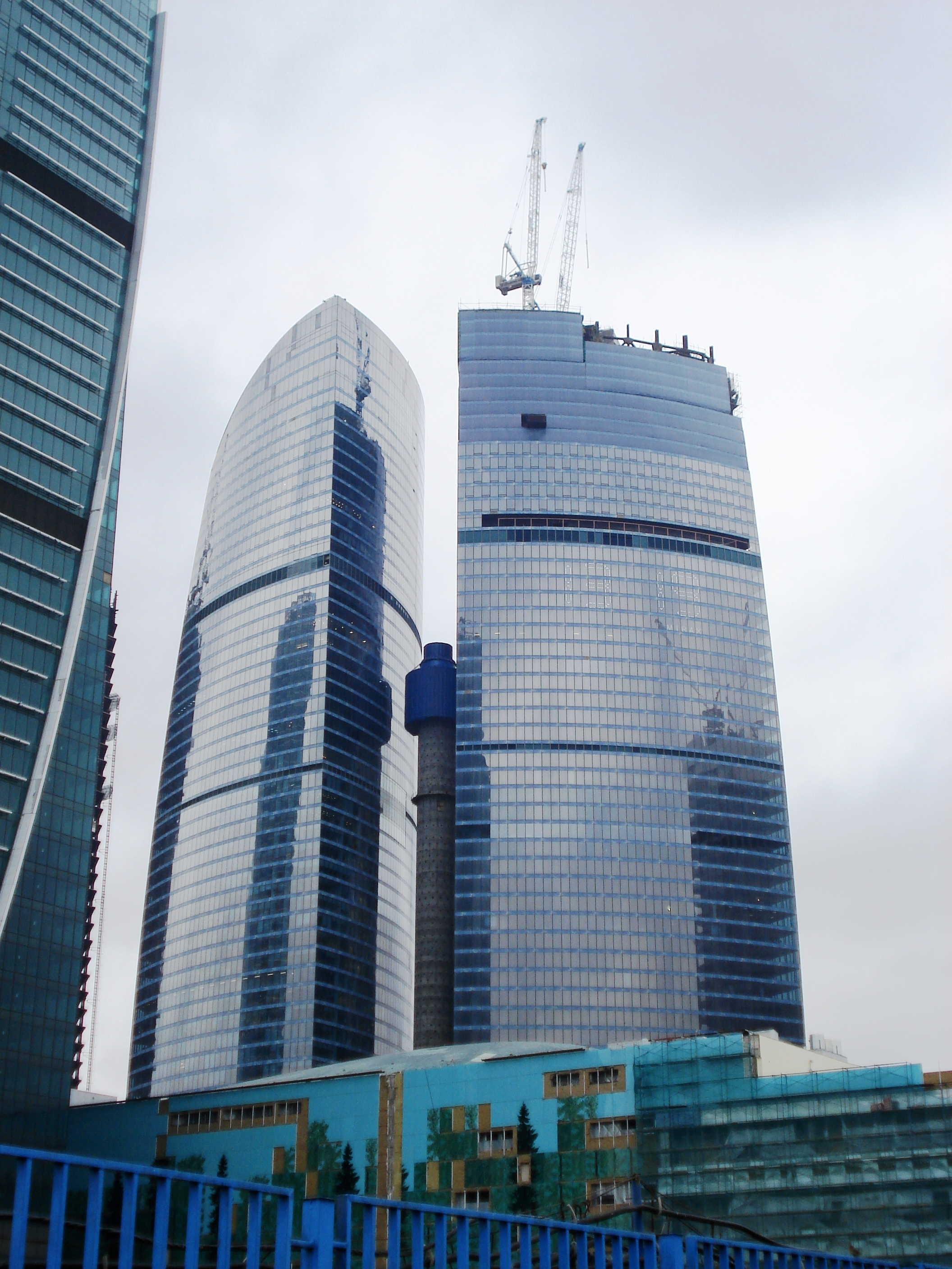 Комплекс Федерация 10 ноября 2010 года